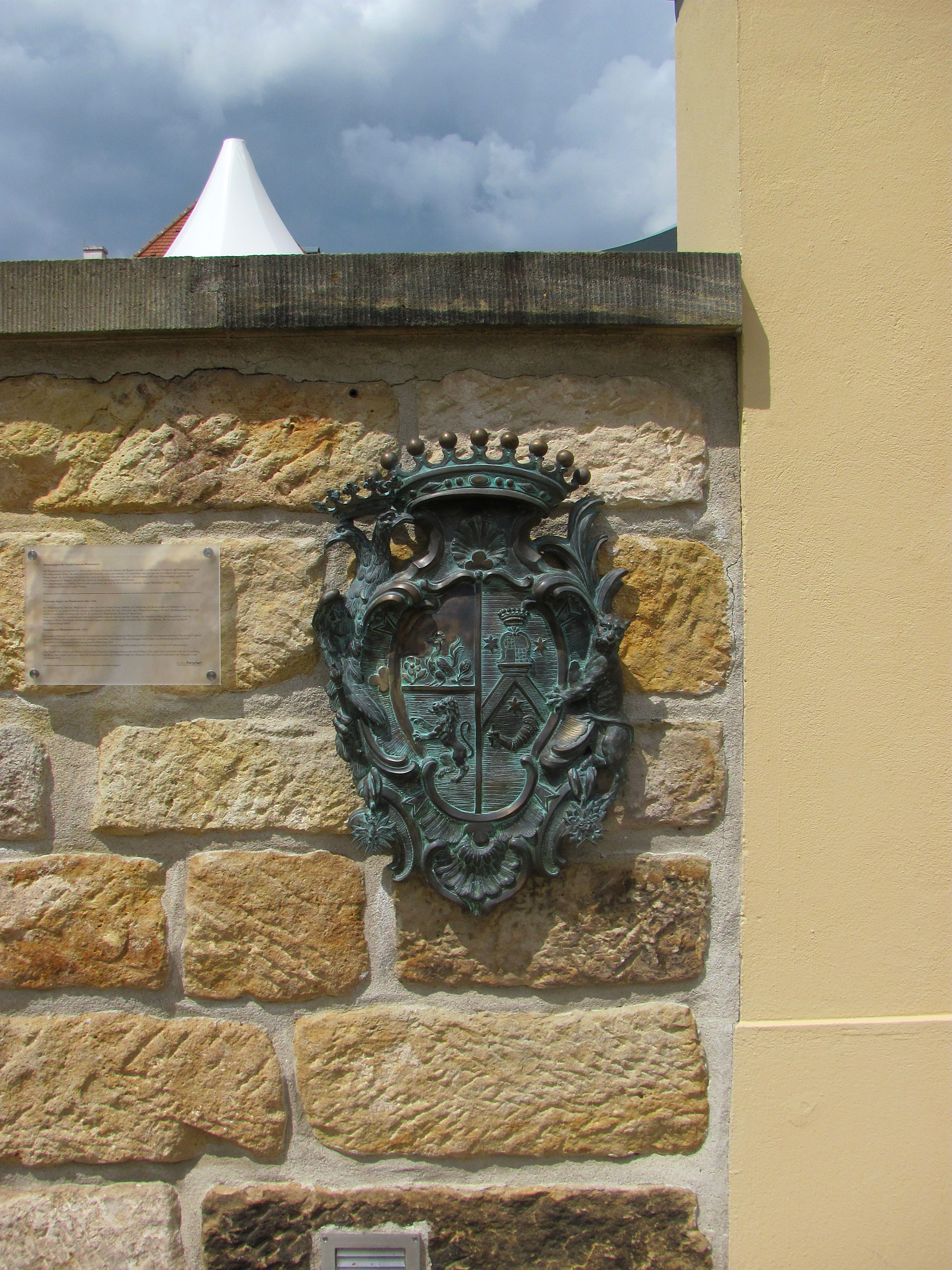 Radebeul-Niederlößnitz, Schloss Wackerbarth, Wappen Wackerbarth-Salmour. Es handelt sich um das Wappen des Grafen Joseph Anton Gabaleon von Wackerbarth-Salmour (1685-1761), Sohn der Caterina Balbiano di Colcavagno (1670–1719) aus ihrer ersten Ehe mit Michele Conte Gabaleone di Salmour. Sie heiratete, als verwitwete Markgräfin von Brandenburg, 1707 in dritter Ehe den Grafen August Christoph von Wackerbarth (1662–1734), der den Stiefsohn adoptierte und ihm das Schloss Wackerbarth (sowie das Schloss Zabeltitz und das Kurländer Palais in Dresden) vererbte. Die heraldisch linke Wappenhälfte, also aus Sicht des Betrachters rechts, zeigt das Wappen des Reichsgrafen Wackerbarth, die andere das Wappen der Familie Gabaleone, Grafen von Salmour, Andezeno und Baldichieri. Es handelt sich um einen Abguß des Stifterwappens vom Reliquienaltar der St. Valentinskapelle in der Kirche San Filippo Neri in Chieri (Piemont), welcher Joseph Anton Gabaleon seine vom Papst erhaltenen Reliquien des heiligen Valentin stiftete.